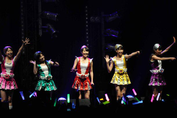 gauche à droite: Ayaka Sasaki, Momoka Ariyasu, Kanako Momota(leadeuse), Shiori Tamai, Reni Takagi